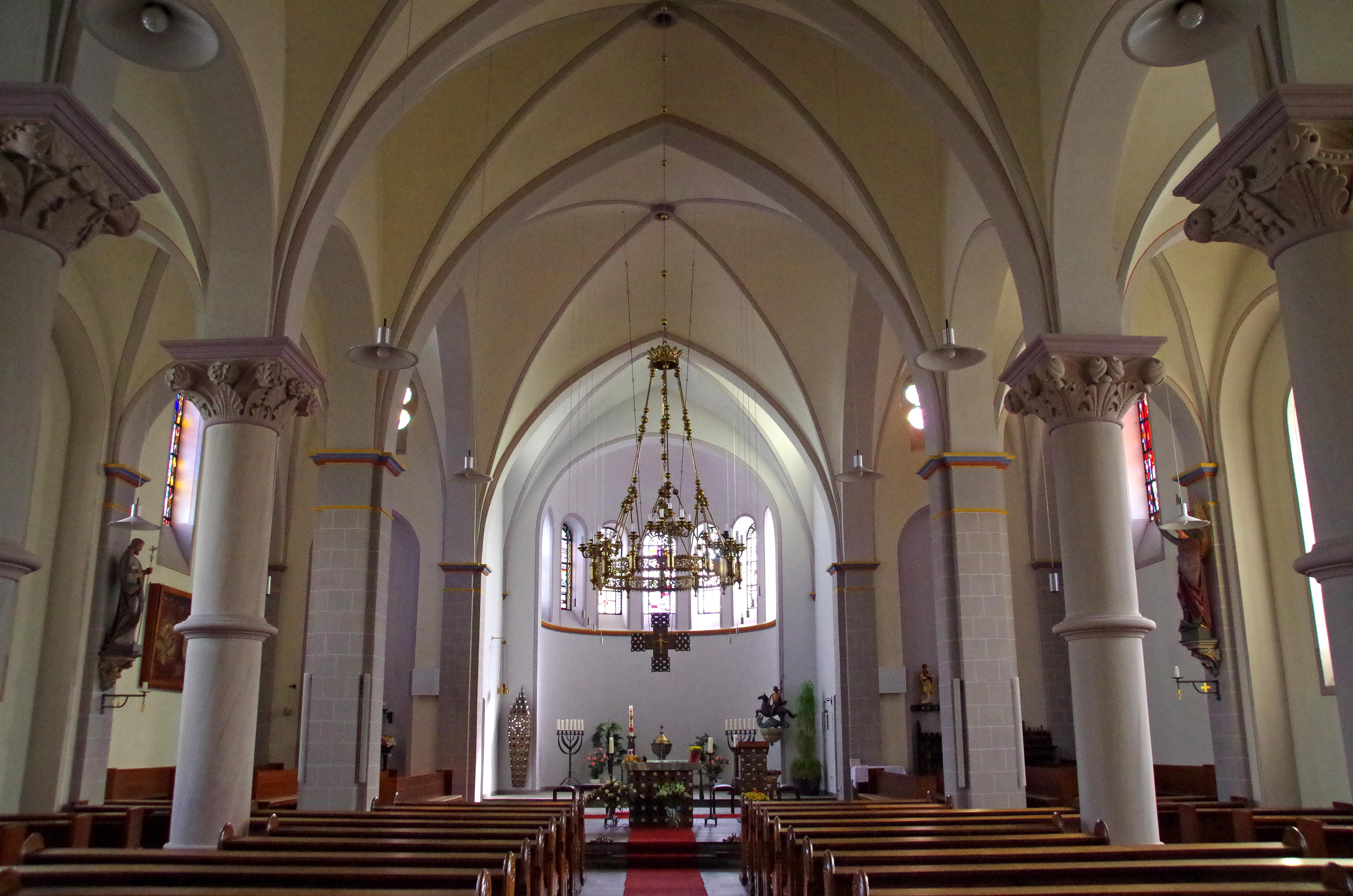 St. Georg (Dreiborn), Mittelschiff